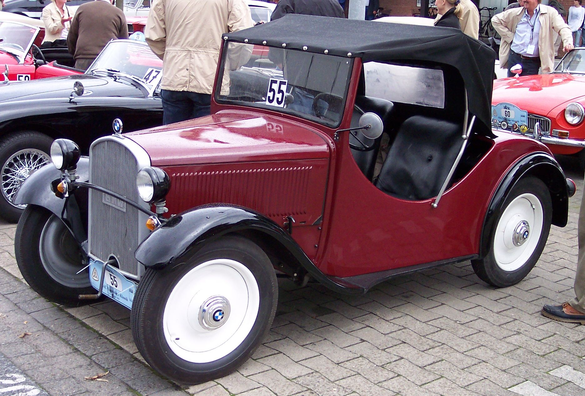 BMW AM 4 1933